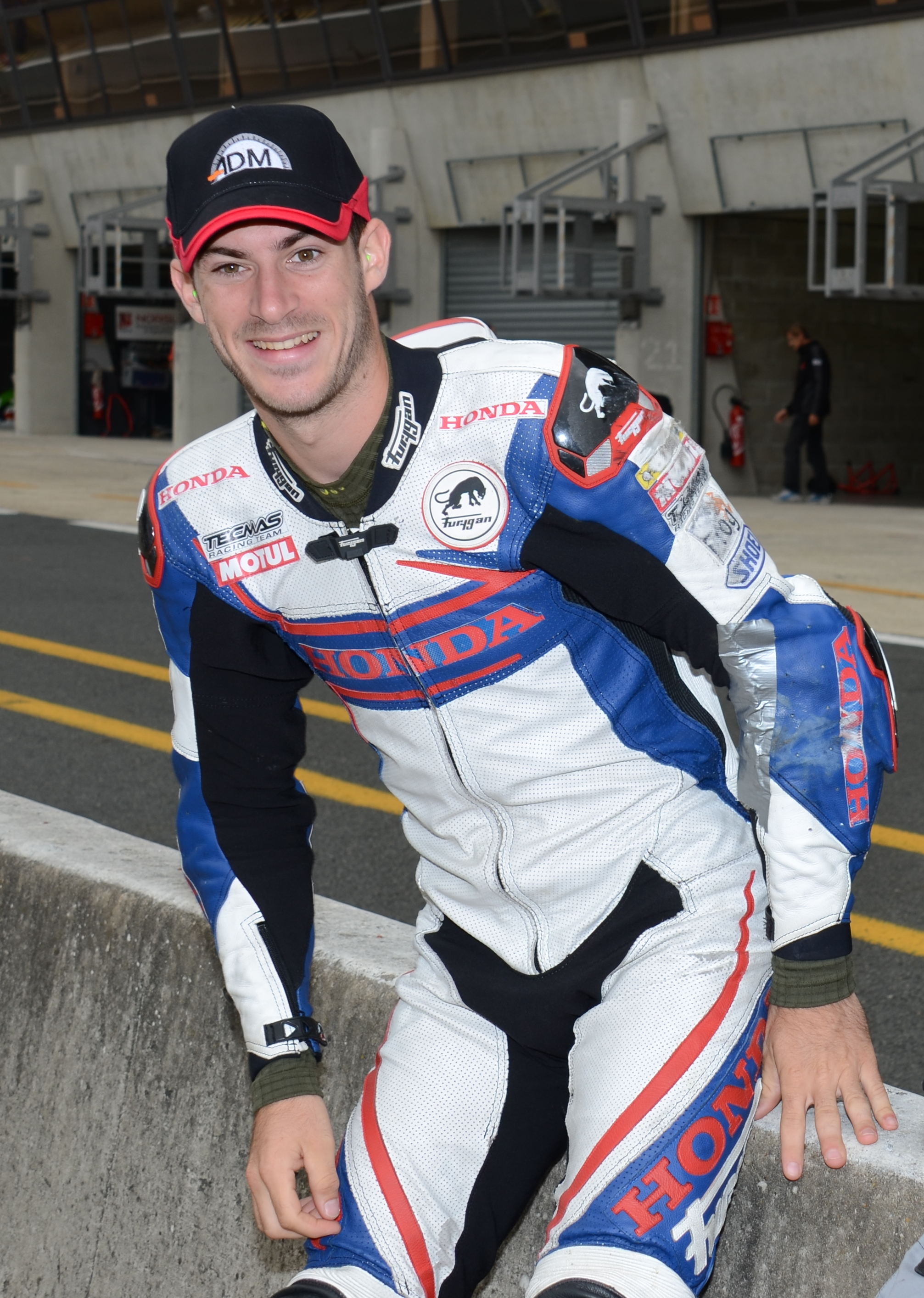 Valentin Debise aux Pré- Mans 2013